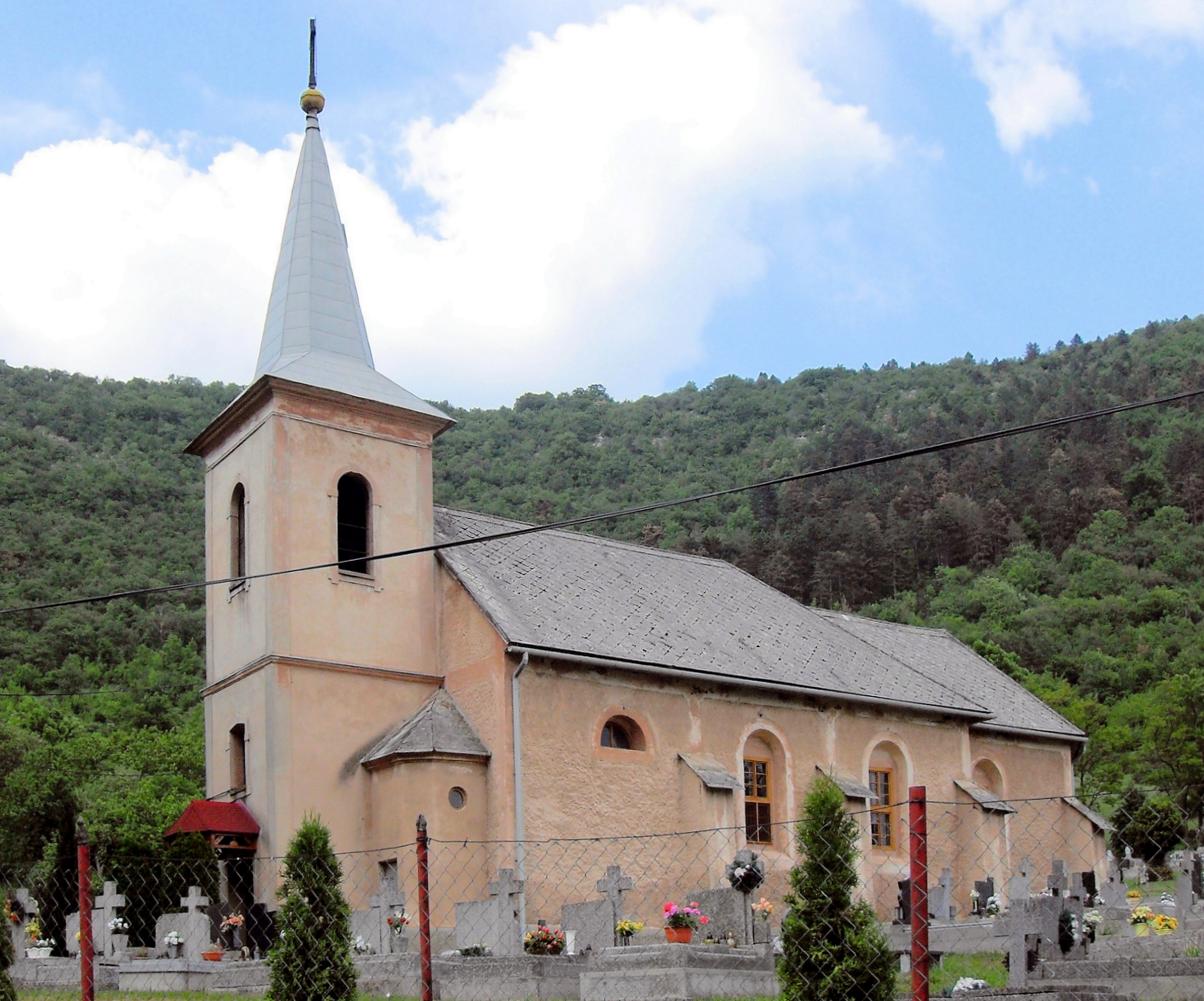 Haj, Rímskokatolícky kostol Svätého Jozefa